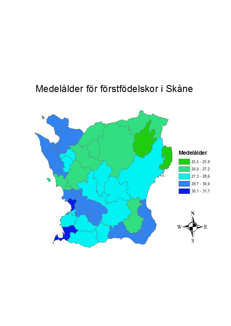 En korpoletkarta som illustrerar medelåldern för förstfödelskor i Skåne. Administrativ enhet är kommun.